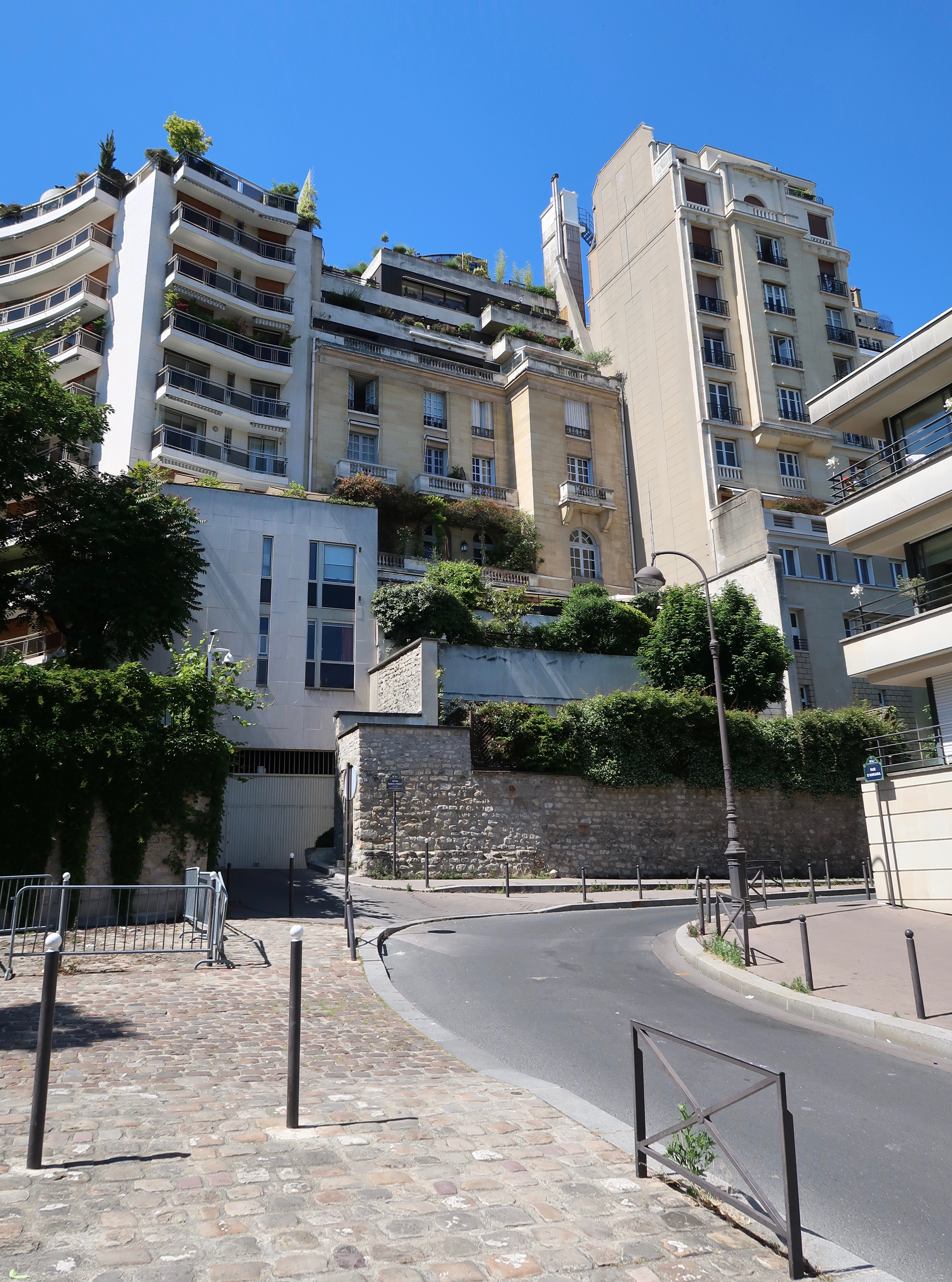 Rue d'Ankara, au croisement avec l'avenue Marcel-Proust (Paris, 16e).